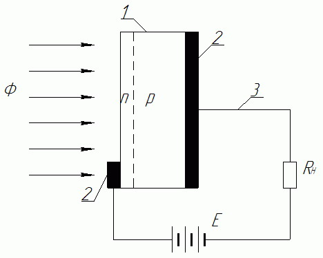 структурная схема фотодиода